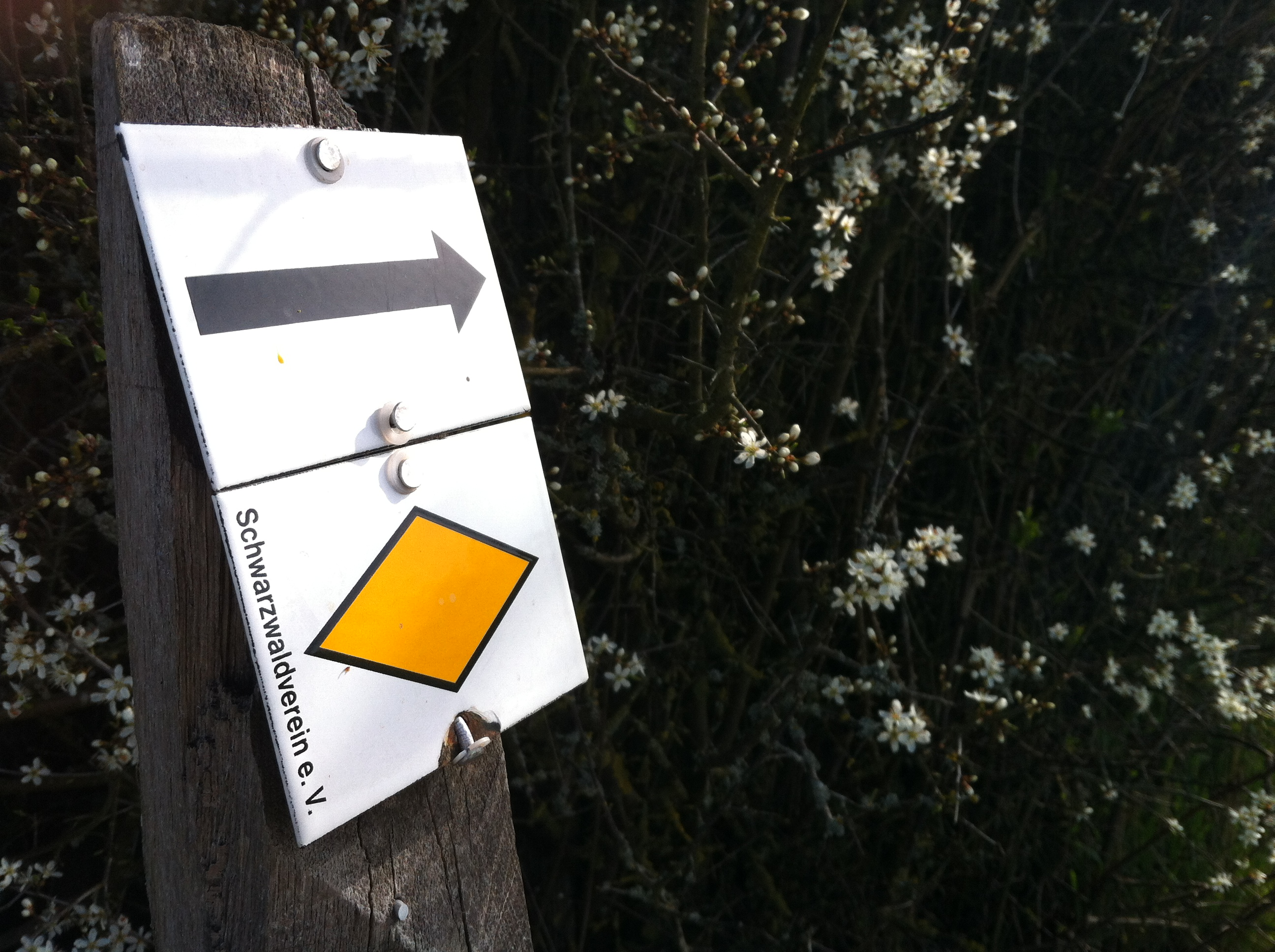 KB Küssaberg, Gemeinde im Landkreis Waldshut in Baden-Württemberg. Gelbe Raute als Symbol der Wanderwege des Schwarzwaldvereins.